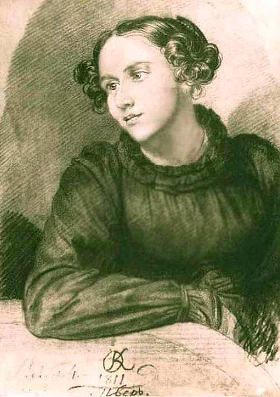 Варвара Александровна Бакунина, ур. Муравьева (1792-1864)